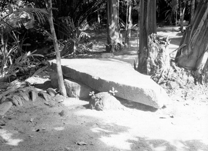 Repronegatief. Grote platte steen in Soja di Atas